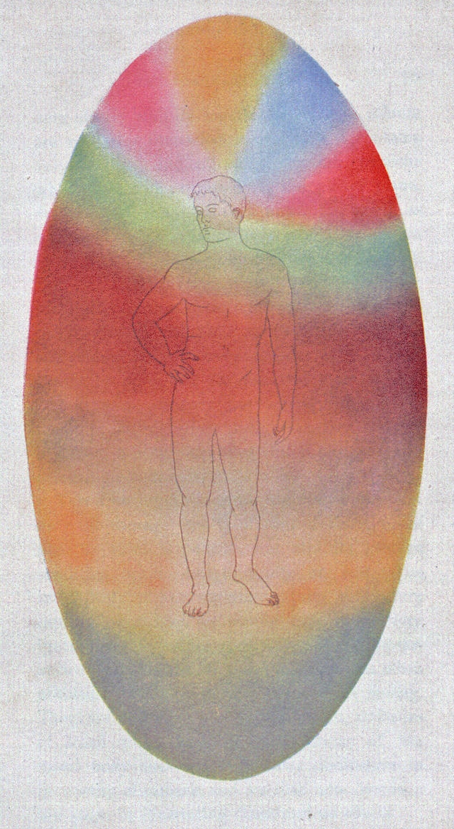 Zeichnung des Astralleibs des durchschnittlichen Mannes